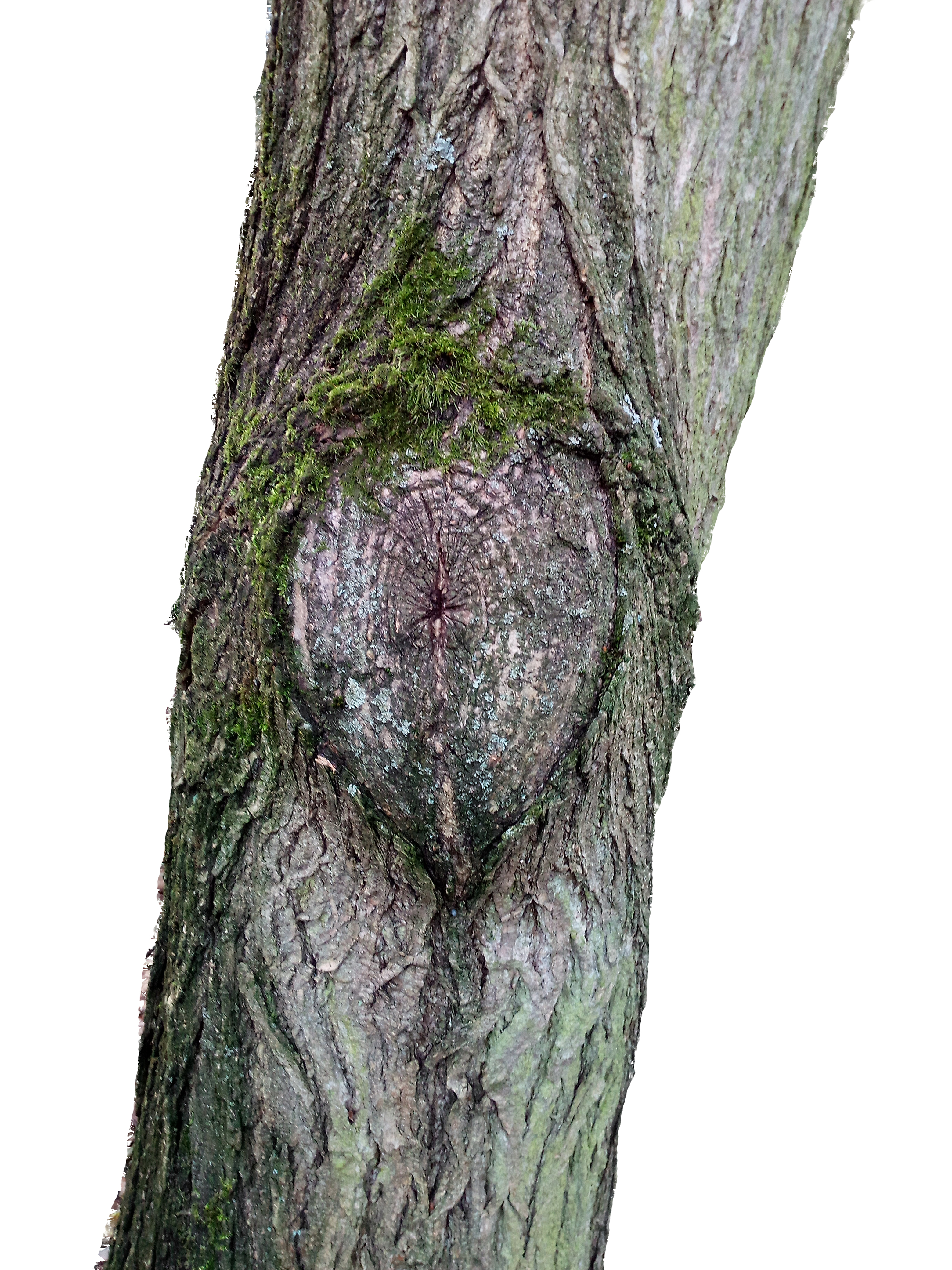 CODIT-Prinzip abgschlossen 2